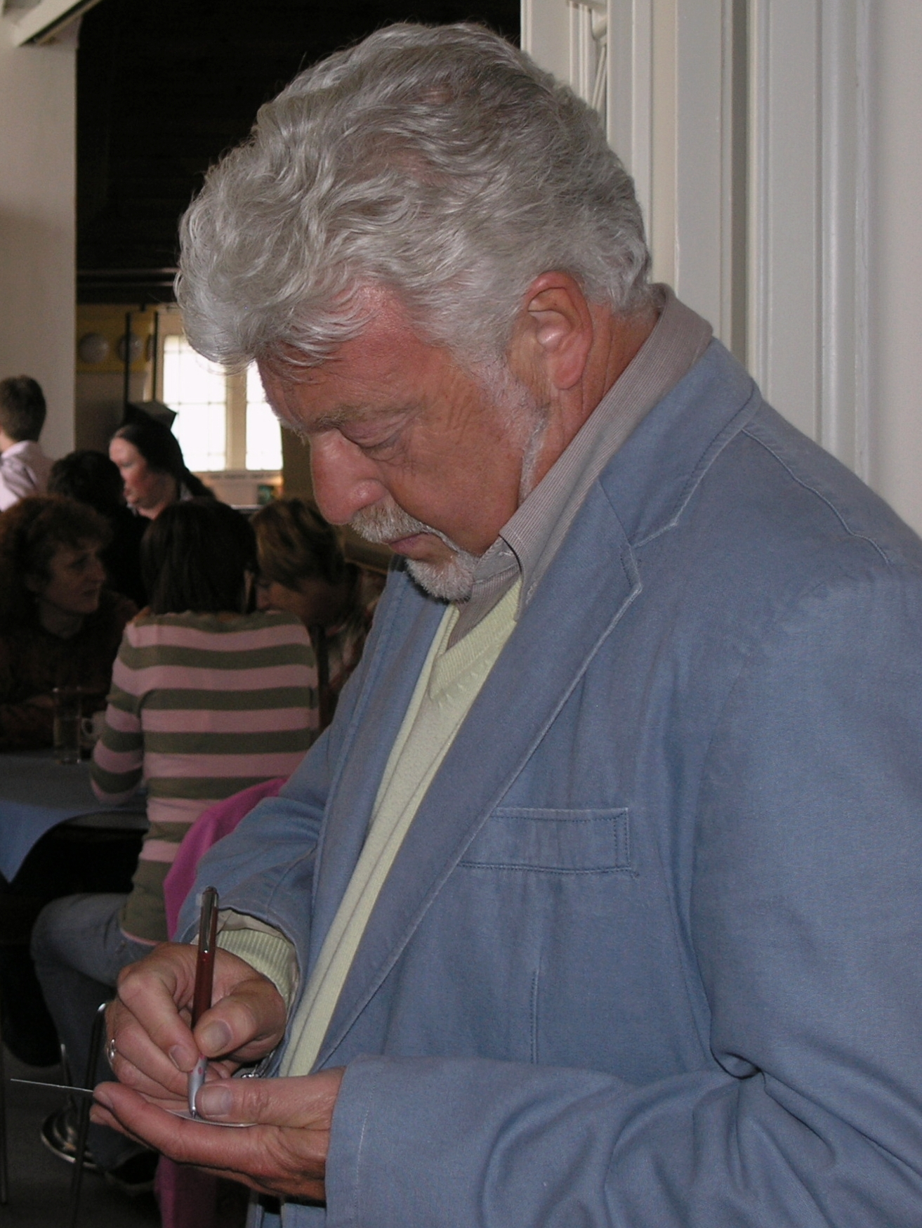 Praha, Svět knihy 2009 - Milan Drobný